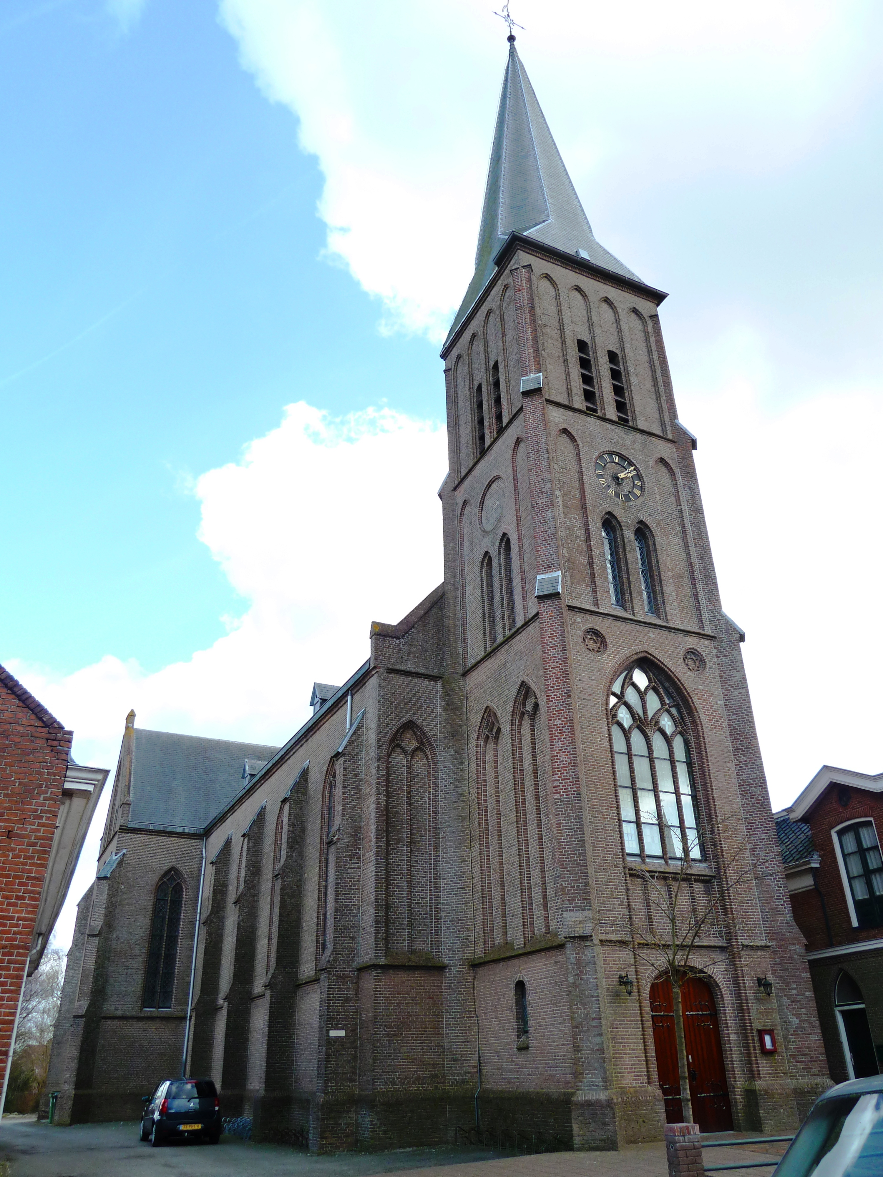 Rooms-katholieke Maria ten Hemelopnemingkerk in Bedum. Gebouwd tussen 1880 en 1881, opgetrokken in neogotische stijl naar een ontwerp van Alfred Tepe.